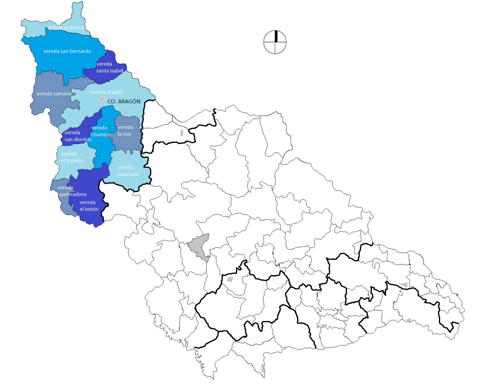 Veredas de Aragón, Santa Rosa de Osos